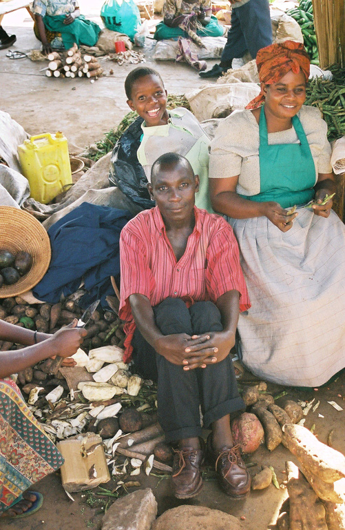 Family in a market, Kampala, Uganda.